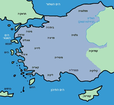 מפה של אזור אסיה הקטנה, נוצרה לפי בקשה בסדנה לגרפיקה